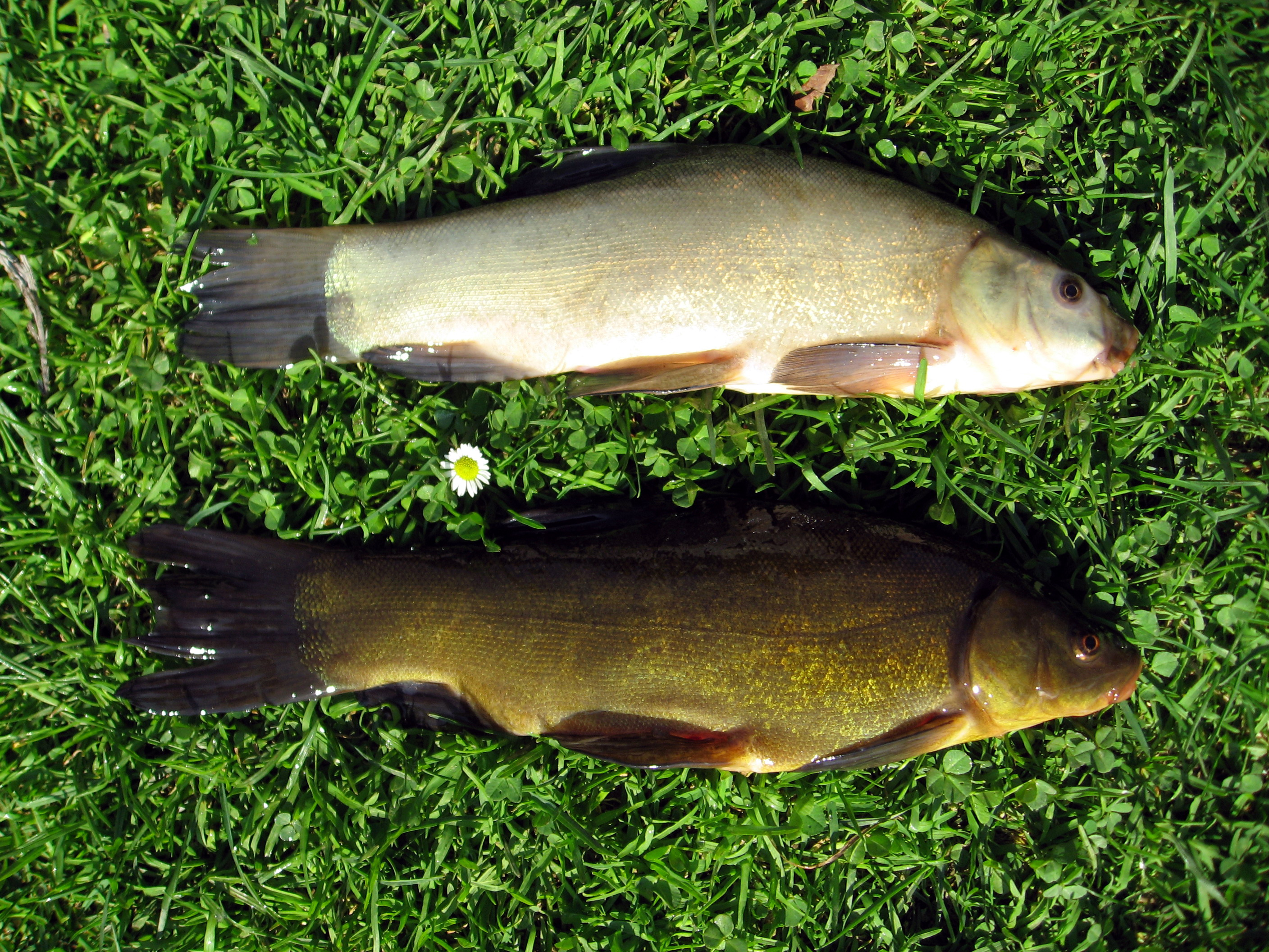 Lín obecný, různé zbarvení